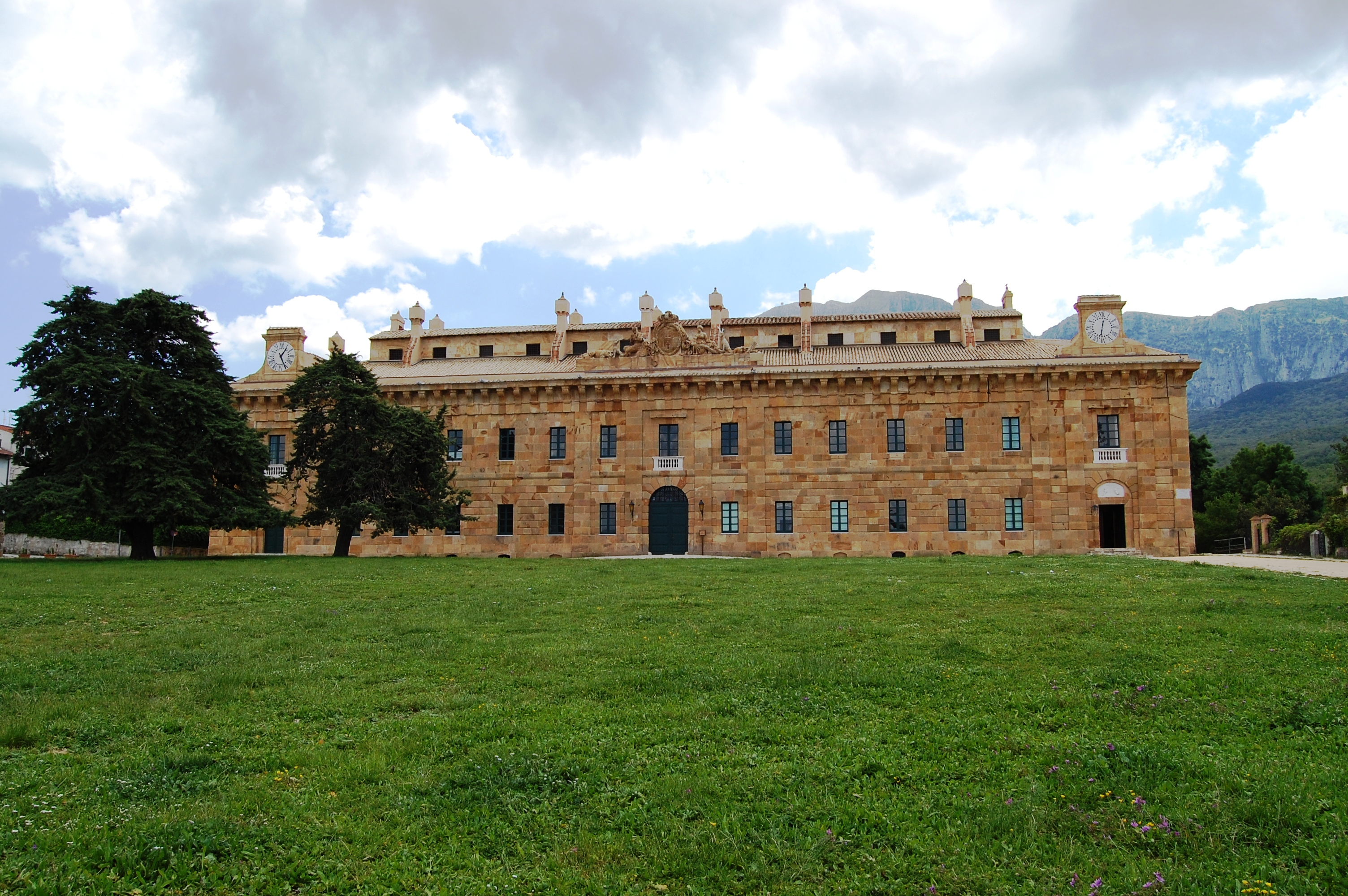 Bosco della Ficuzza, Sicily Casina reale di caccia